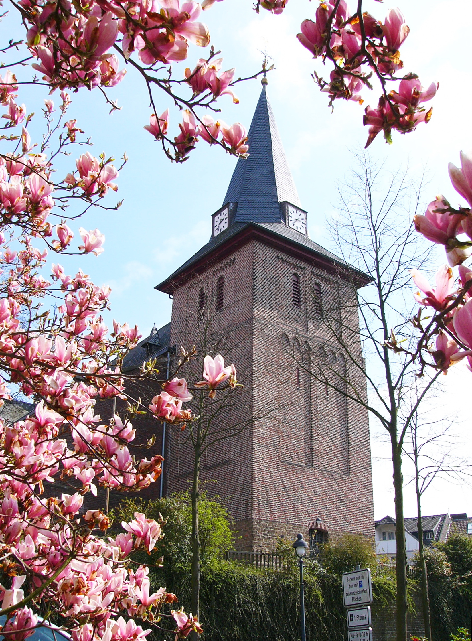 Turm der Pfarrkirche St. Peter und Paul